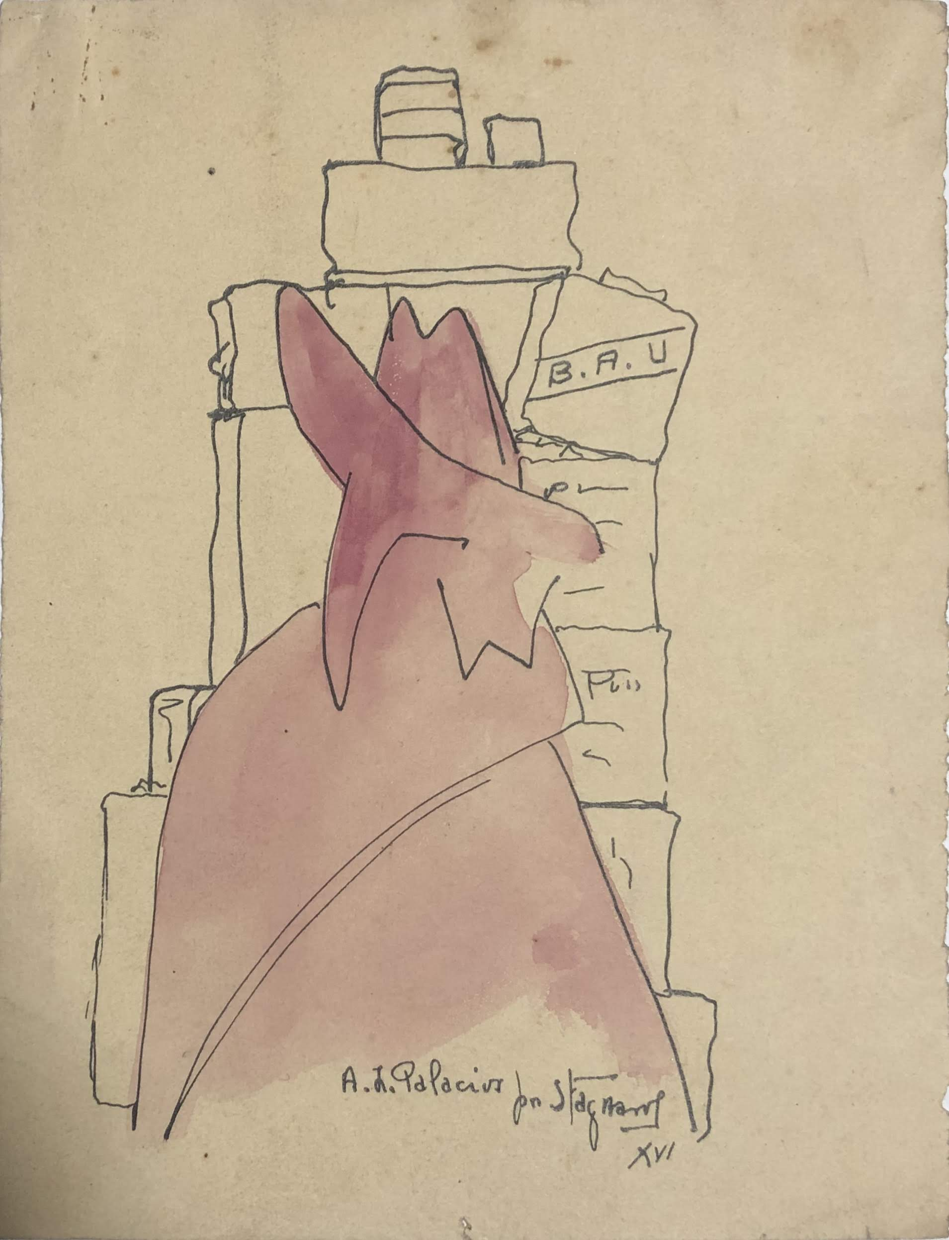 Alfredo Palacios, 1916, tinta y aguada color